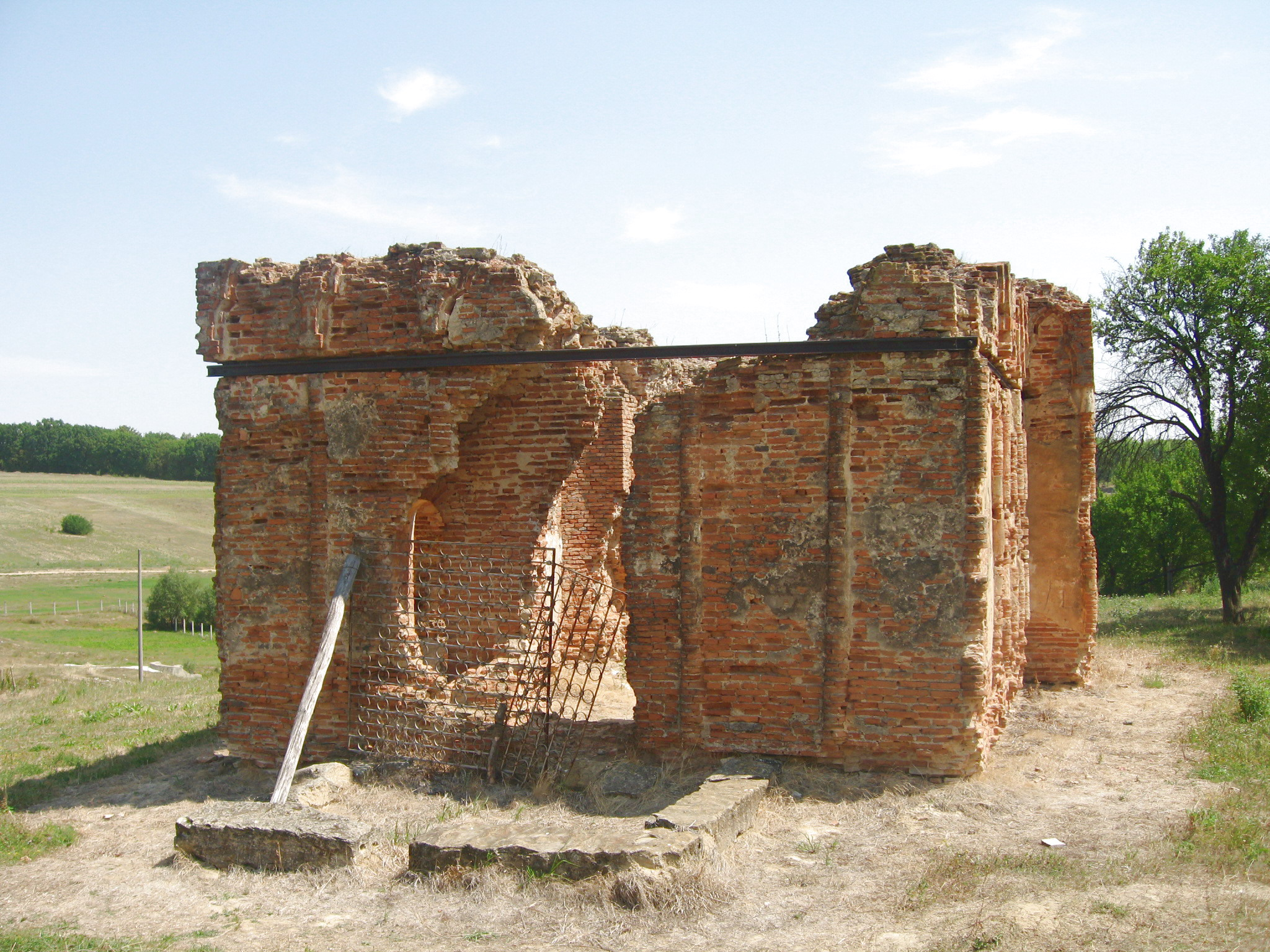 Mănăstirea Stavnic